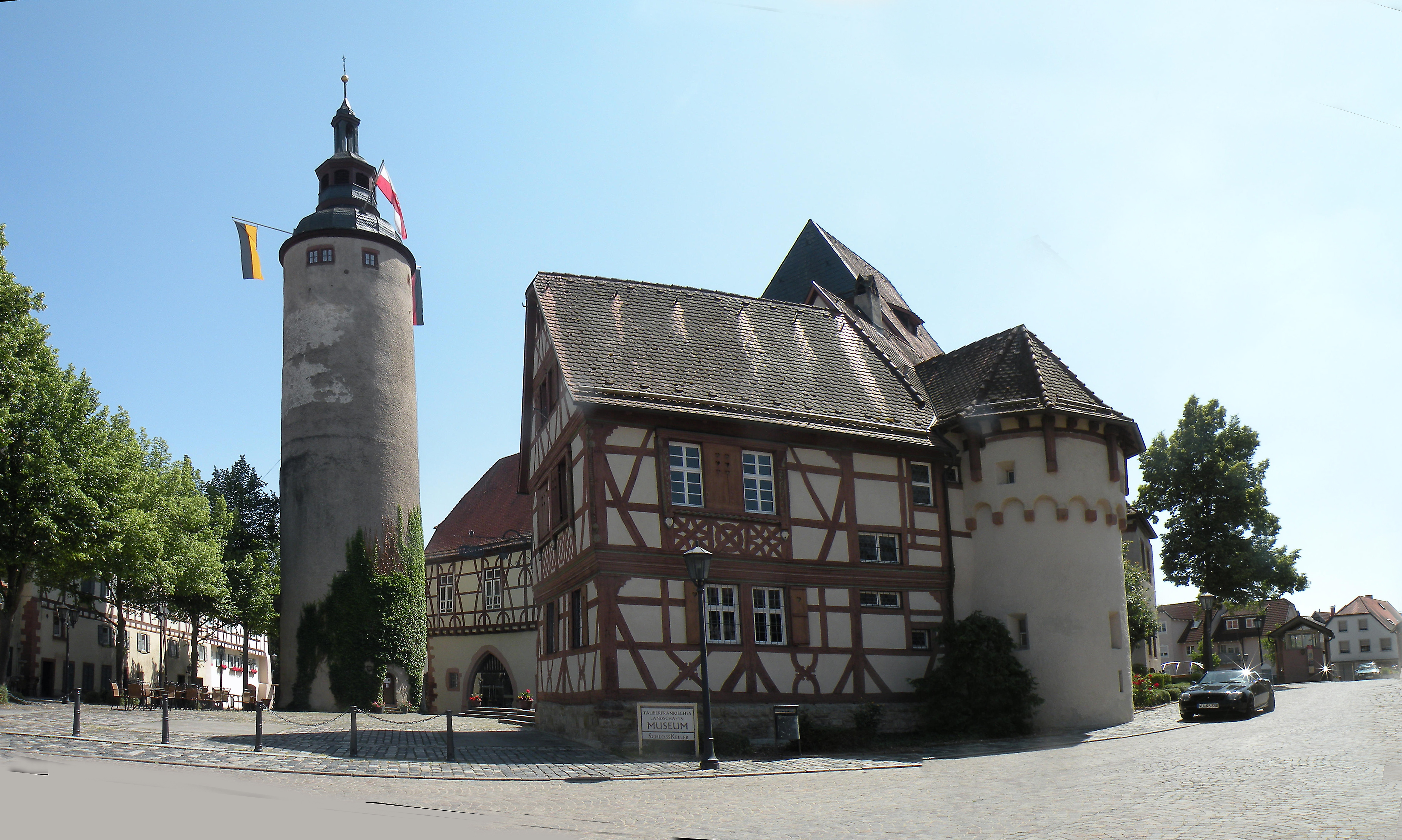 Замок под управлением курфюрста Майнца.